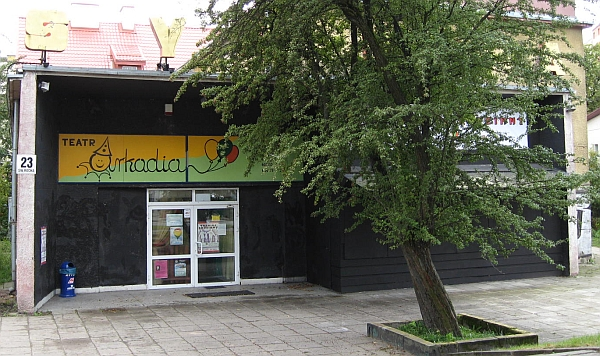 Budynek Teatru Arkadia Białystok, od frontu (ul. Św. Rocha).